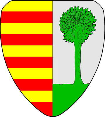 Armoiries de la commune de Bilzen, blasonné parti: au 1 burelé d'or et de gueules (Looz ancien), au 2 d'argent à un arbre nourri de sinople sur un tertre du mesme (Bilsen)